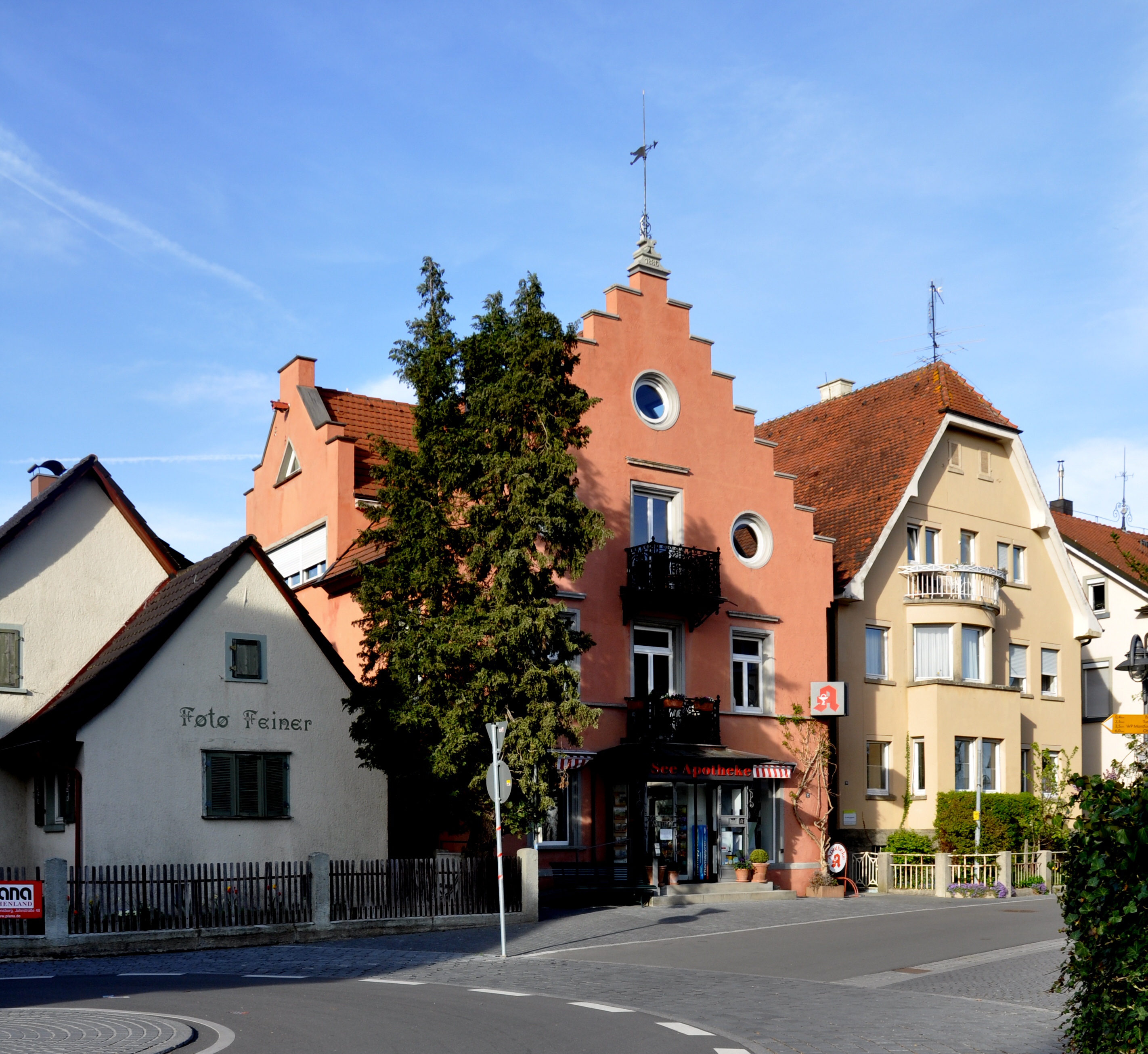 Langenargen, Obere Seestraße, Seeapotheke